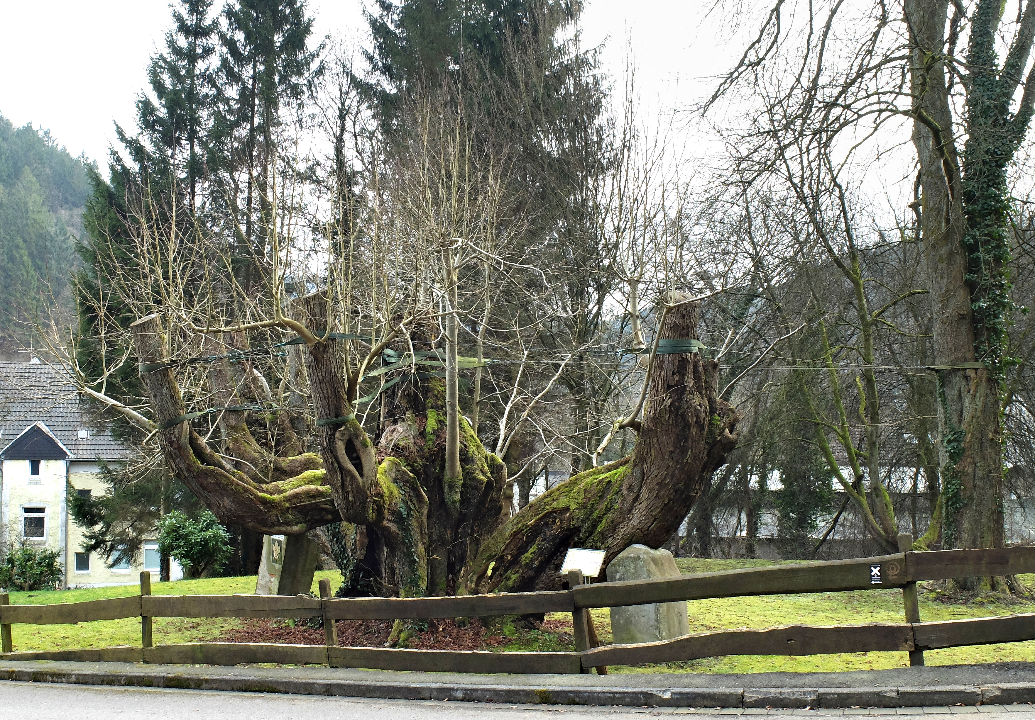 Naturdenkmal Priorlinde in Priorei Zur Priorlinde 14, Stadt Hagen (NRW) geo:51.28798343,7.51861810999,193